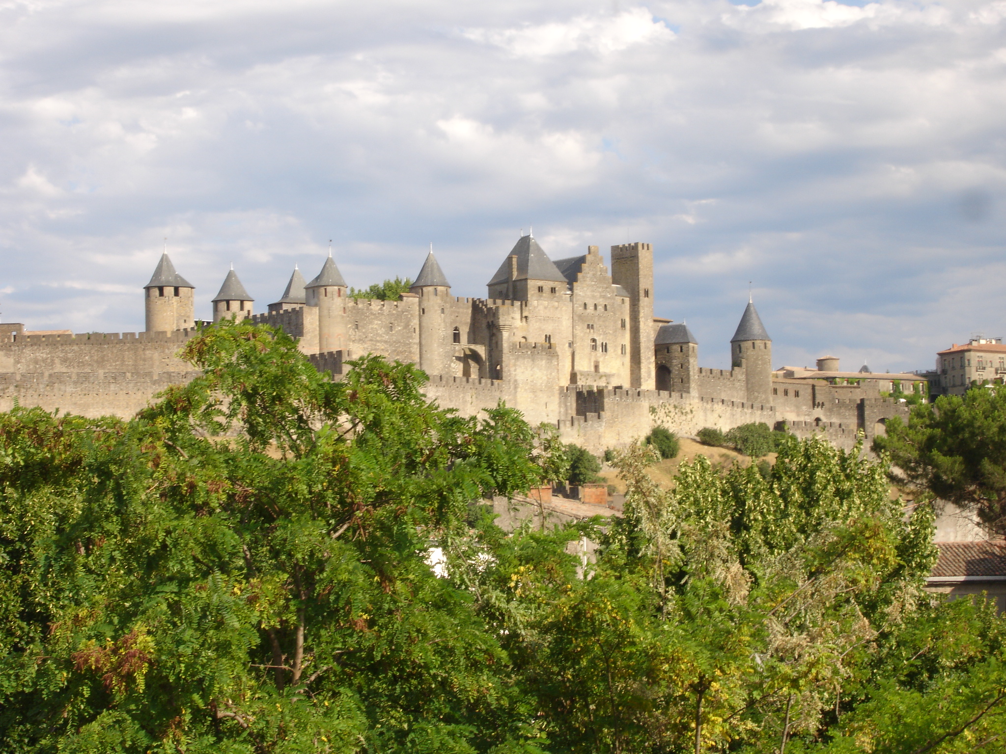 France, Aude (11), Carcassonne, vue générale de la cité